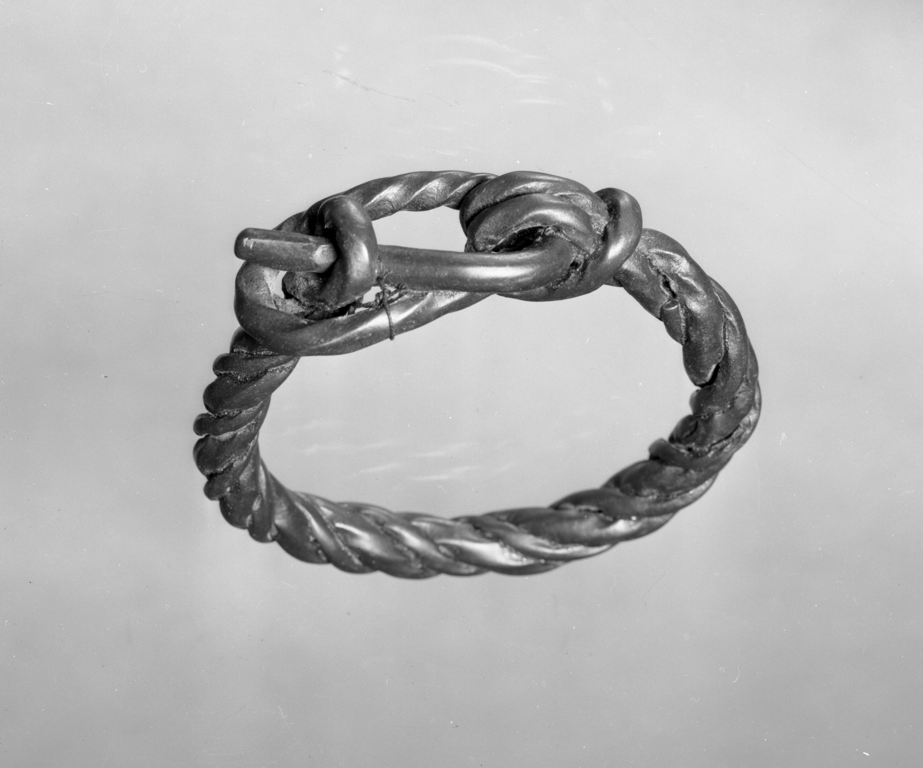 Olavsspenningen fra Våler kirke i Hedmark, muligens brukt som dørring i Mariakirken i middelalderen. Nå i Oldsaksamlingen. Ukjent fotograf. Bilde fra Unimus (jf. søk).